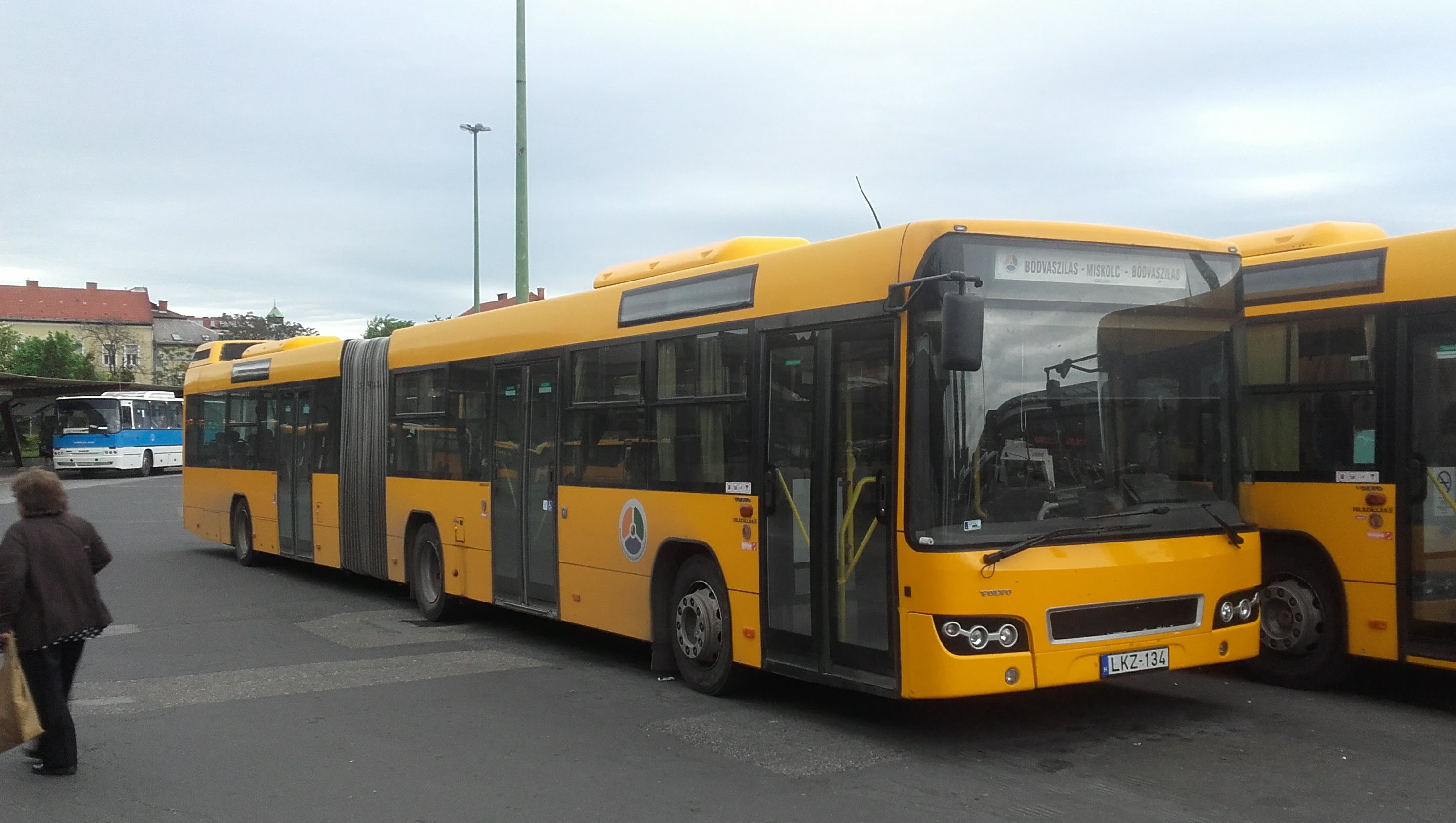 Az ÉMKK LKZ-134 rendszámú Volvo 7700A típusú busza Miskolcon, a 3707-es helyközi járaton